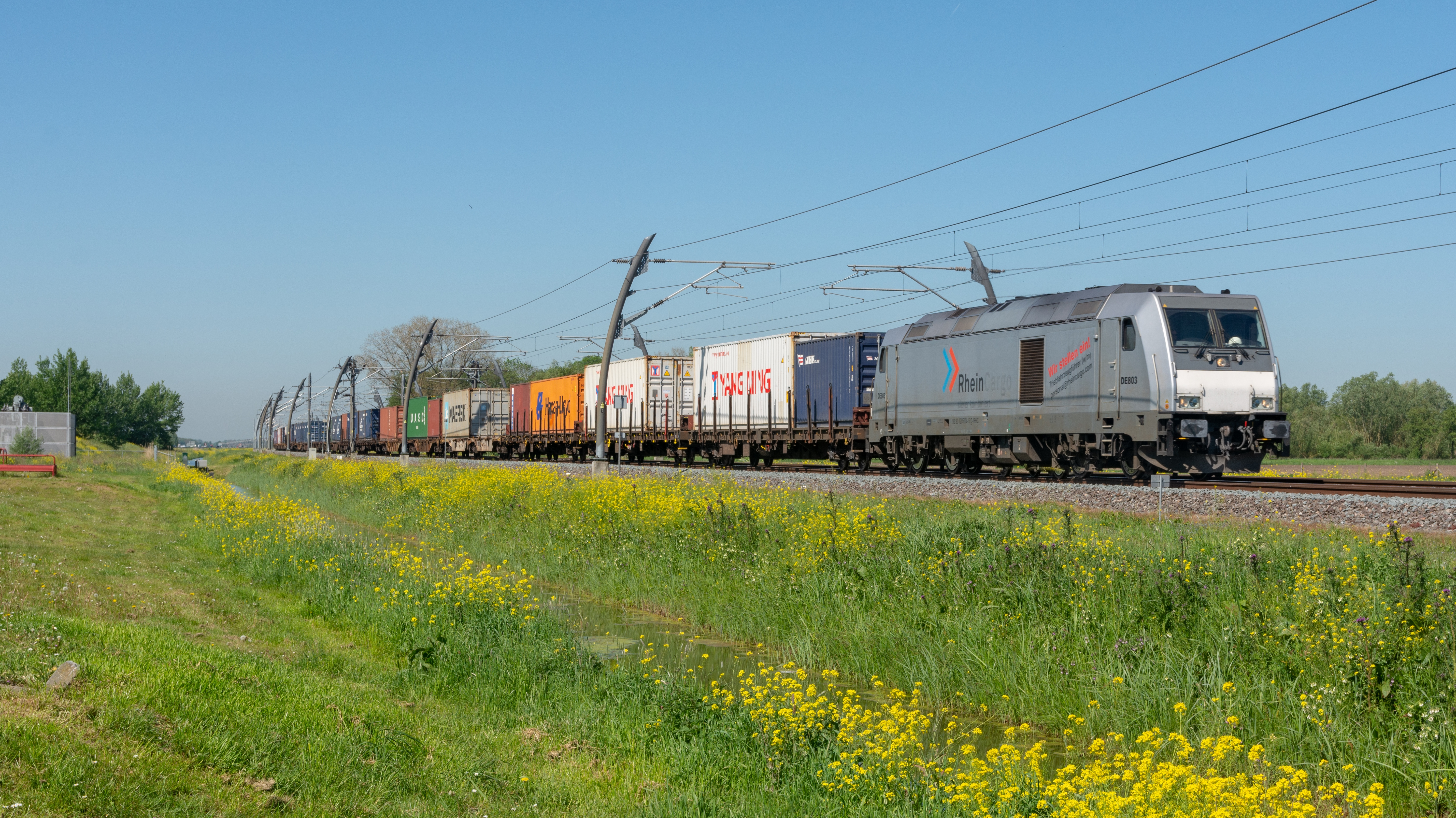 In de omgeving van Haaften op de Betuwe Route rijdt de diesel TRAXX van Rhein Cargo 803 met de DüKo Shuttle in de richting van Duitsland.